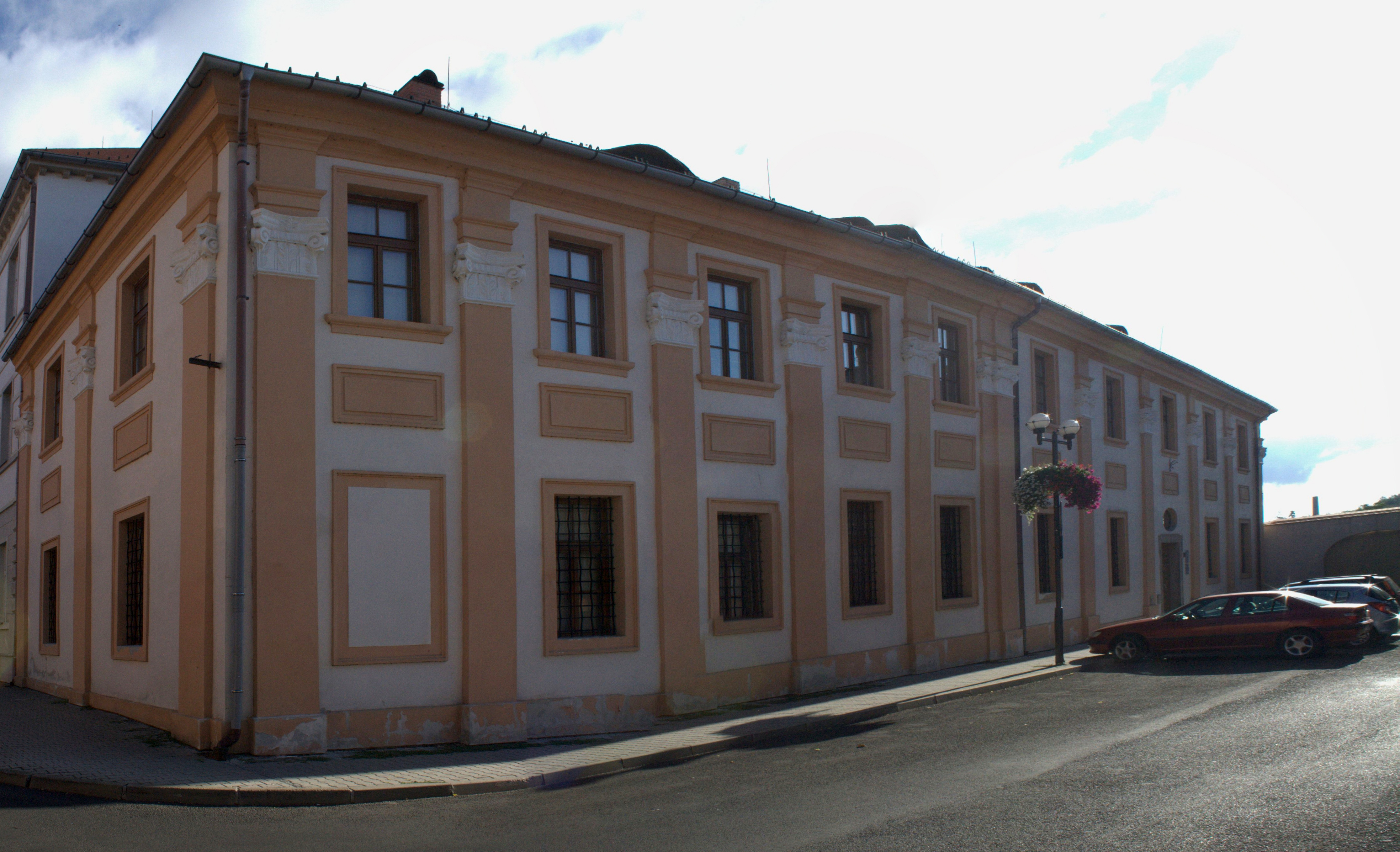 Sídlo Gymnázia v Kadani v letech 1803-1823 (dnes Státní archiv v Kadani)